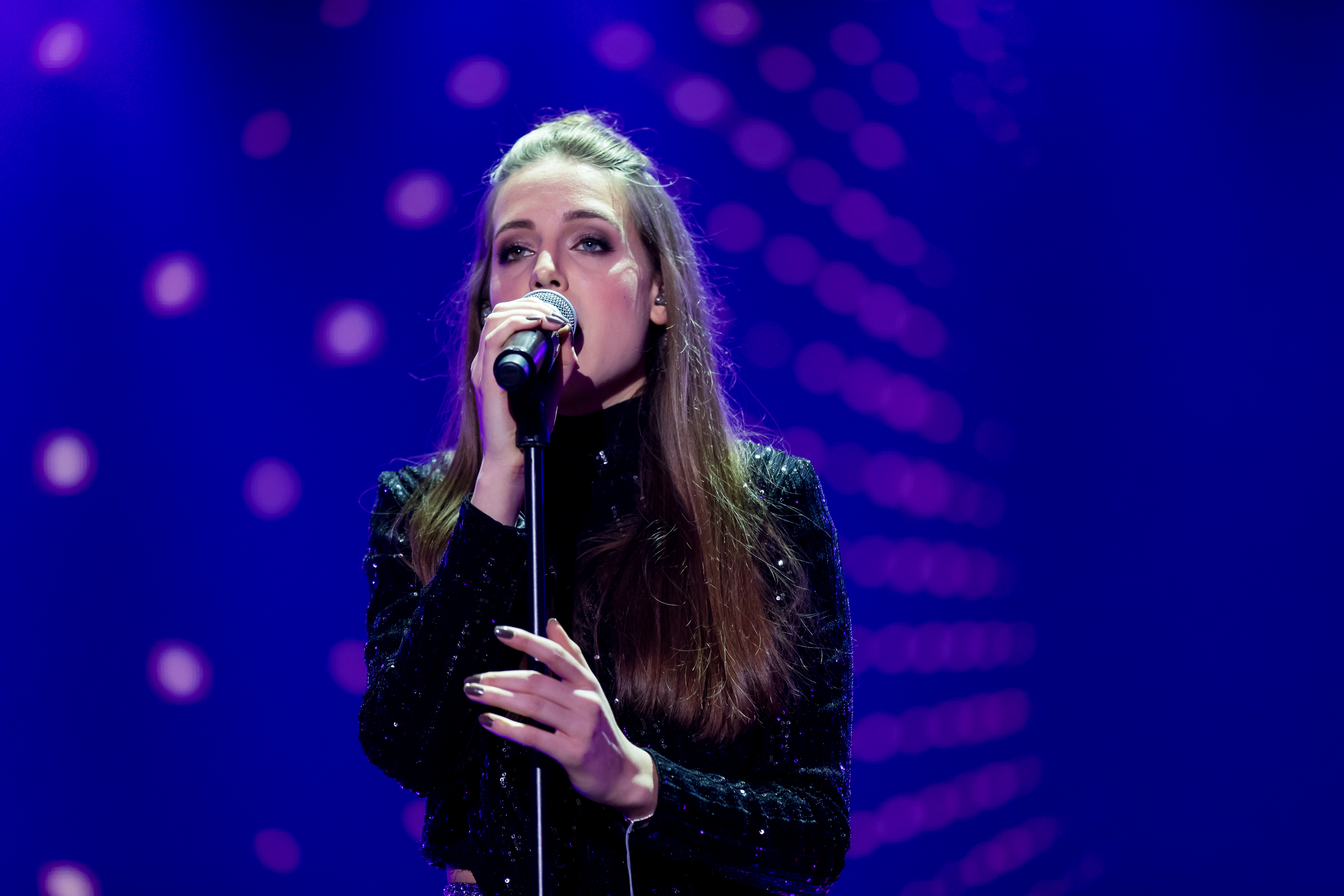 Unser Song 2017 (Probentag) für Eurovision Song Contest 2017 during Eurovision Song Contest - Unser Song 2017 at , Köln, Nordrhein-Westfalen, Germany on 2017-02-08, Photo: Sven Mandel